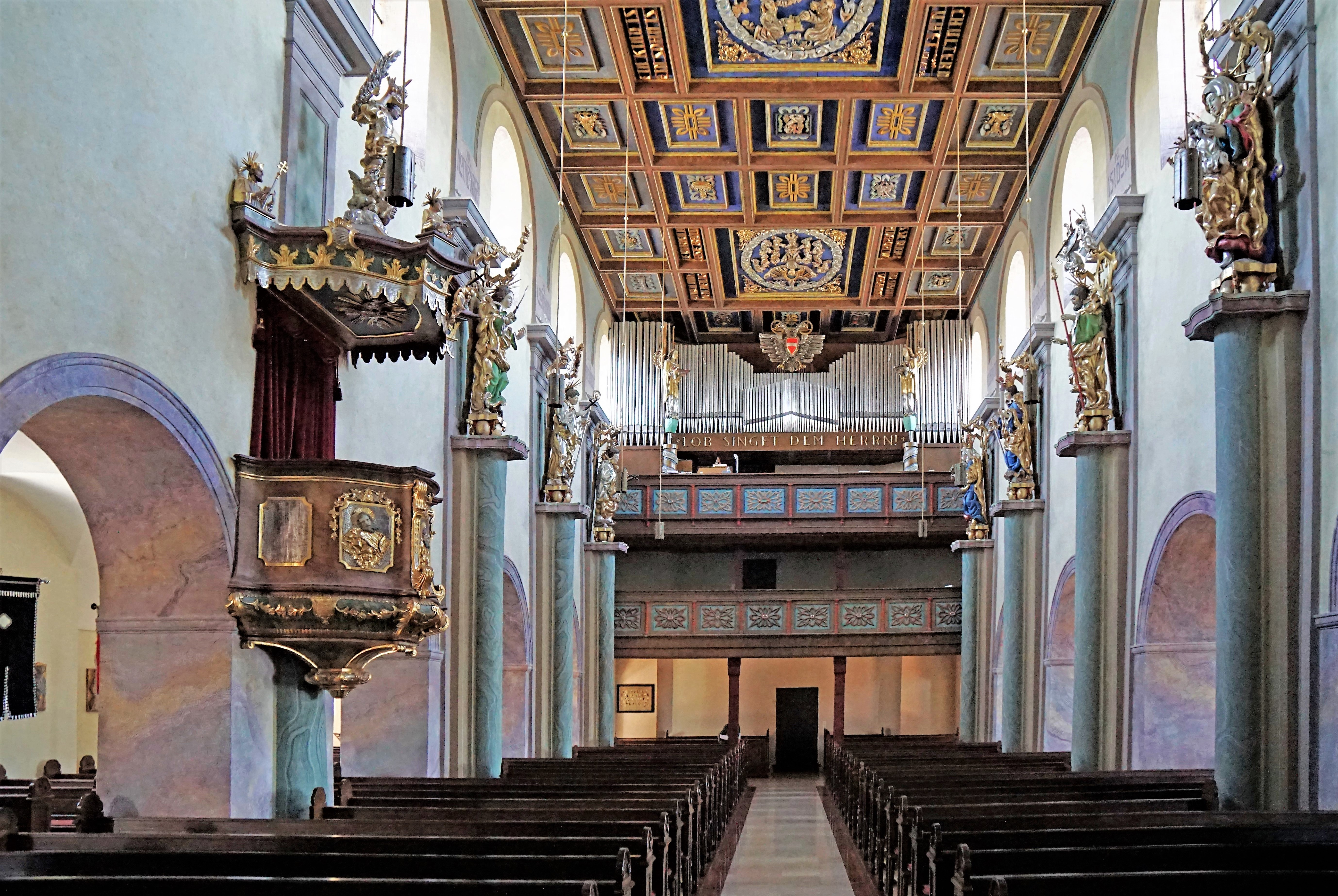 .Kath. Pfarrkirche Hl. Jakobus d. Ä. (BDA-ID: 7975), Obertrum am See, Innenansicht gegen die Orgelempore